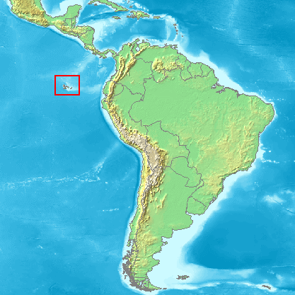 Galápagos Islands